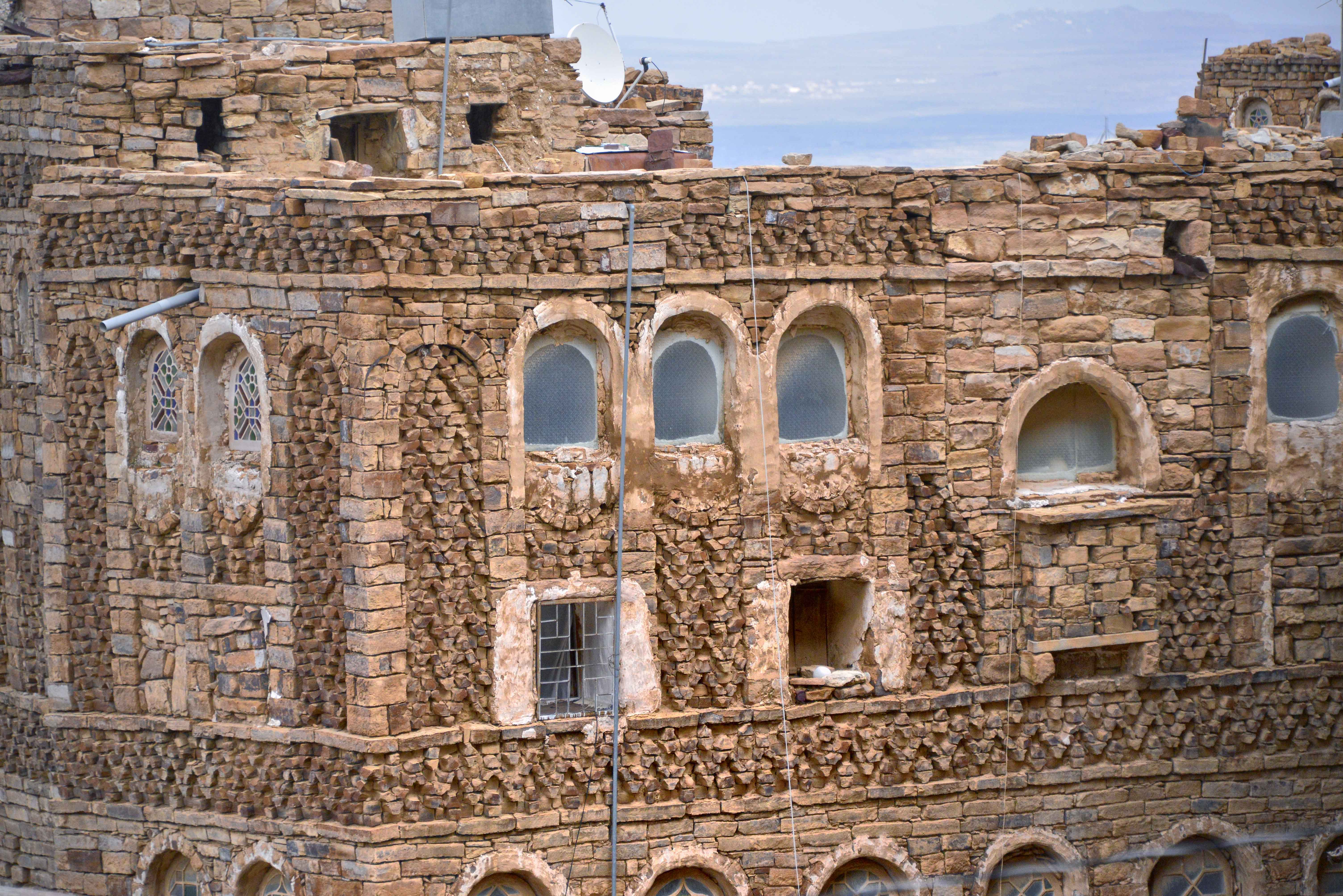 Yemen